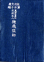 『立川文庫第40篇 真田十勇士忍術名人 猿飛佐助』、立川文庫、1913年